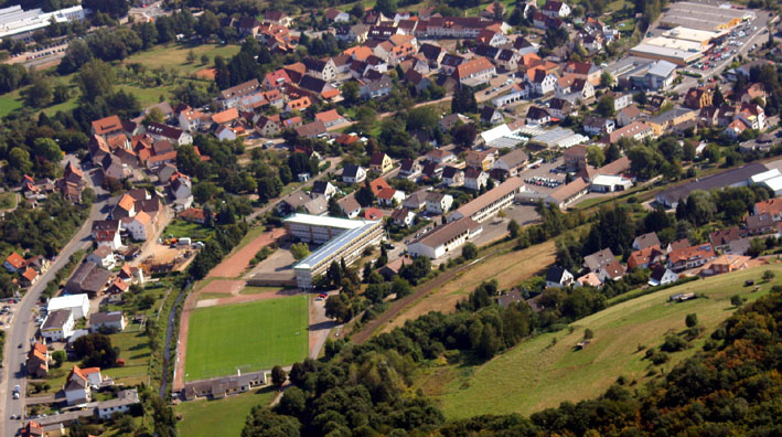 Luftaufnahme von Altenglan, mit Sportplatz und Schule.